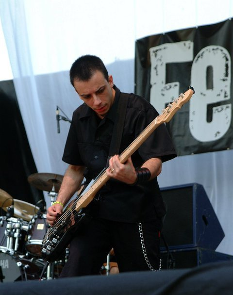 Sergio Torroba Bajista